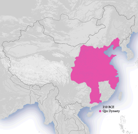 Cheun Dynasty 210 BCE.png